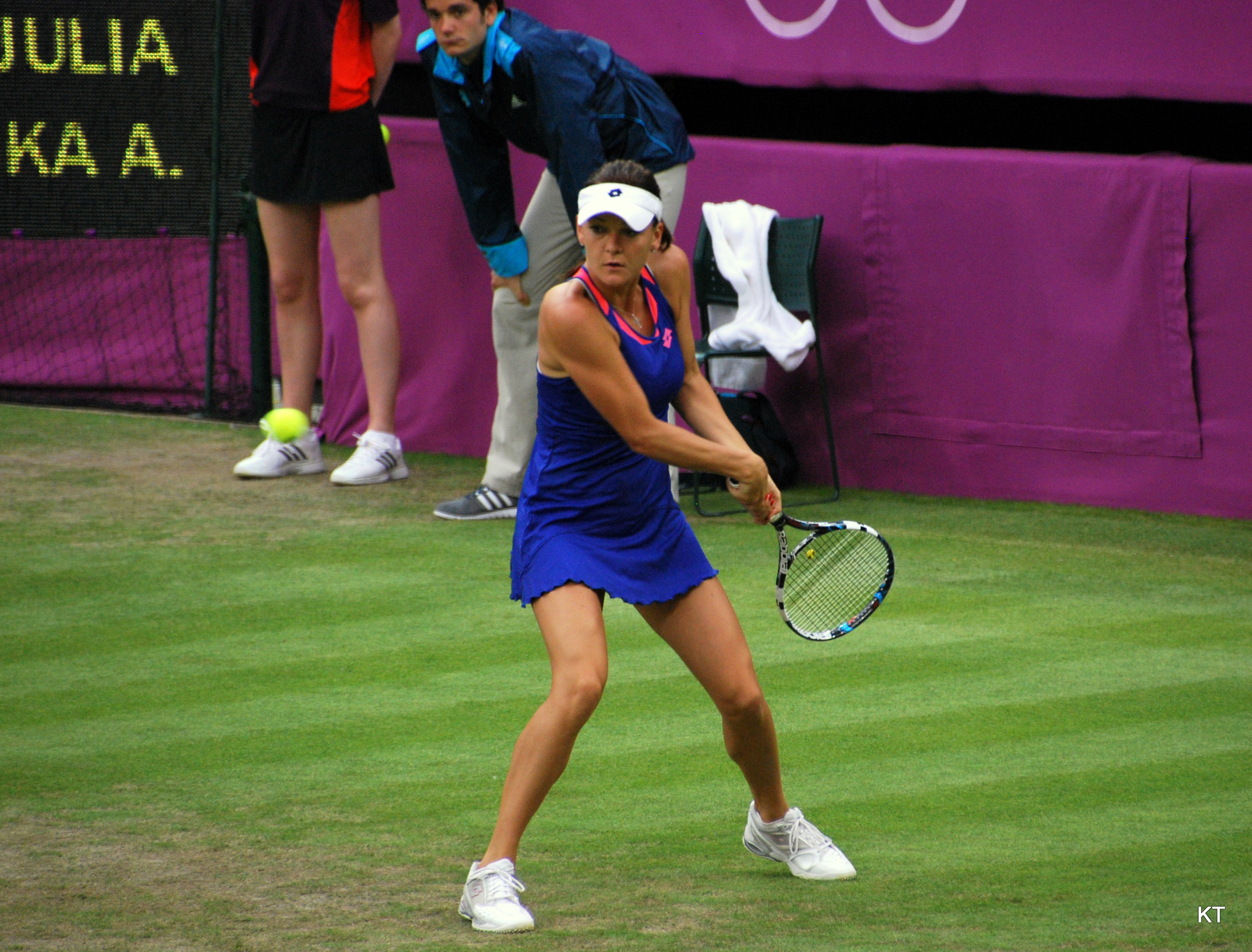 Agnieszka Radwańska at 2012 Summer Olympics